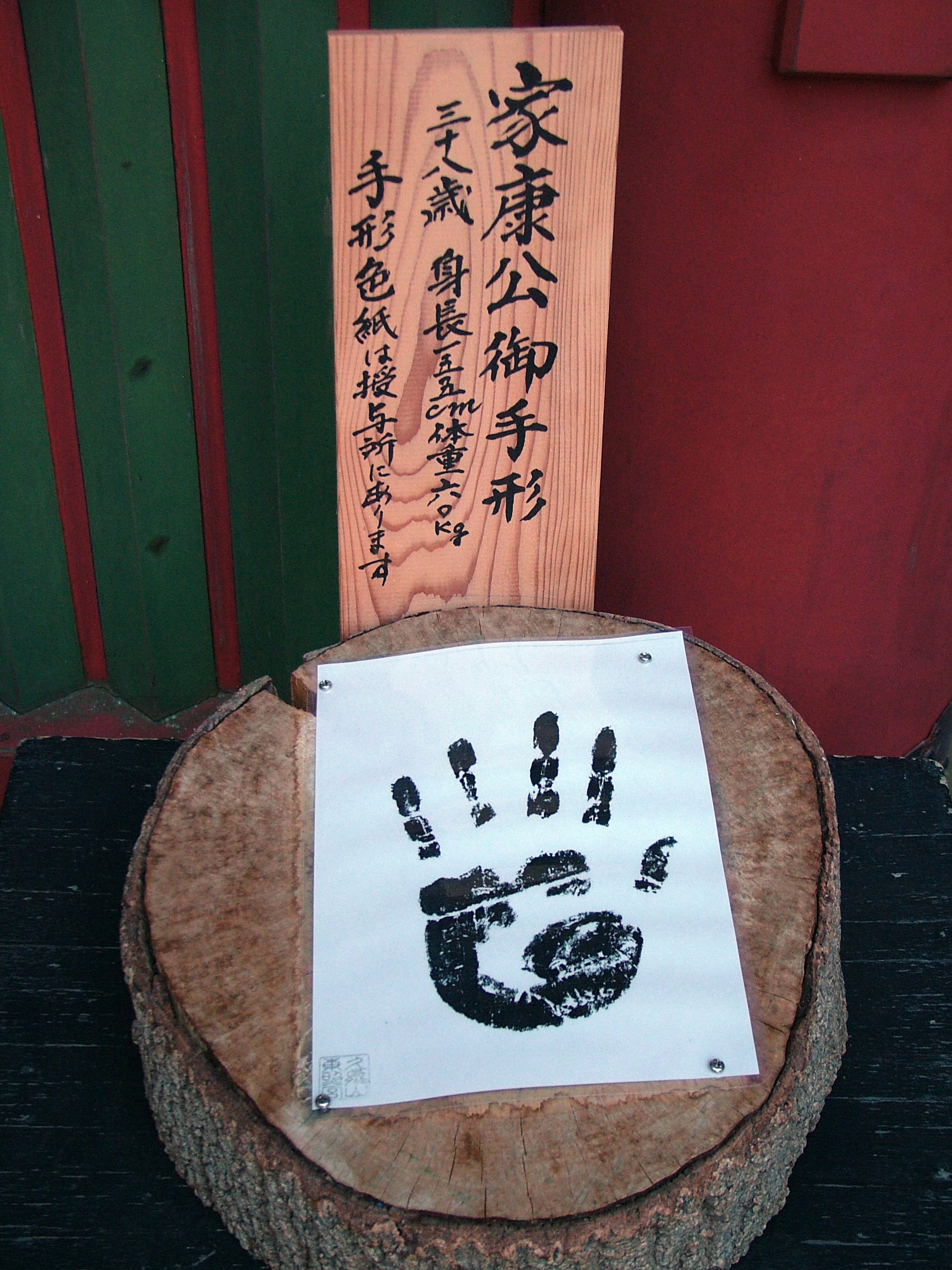 A handprint of Tokugawa Ieyasu at Kunozan Toshogu.